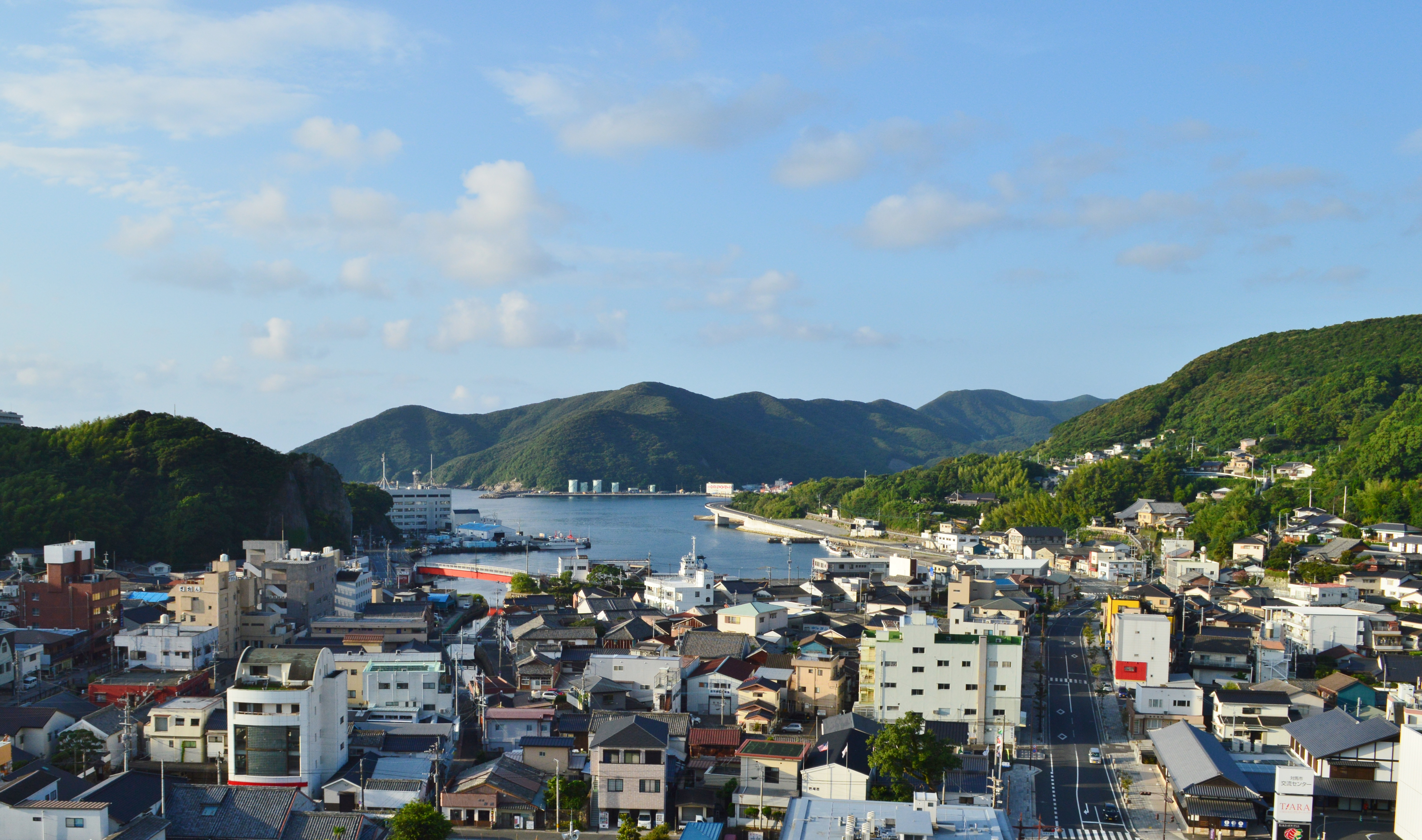 対馬島 厳原湾